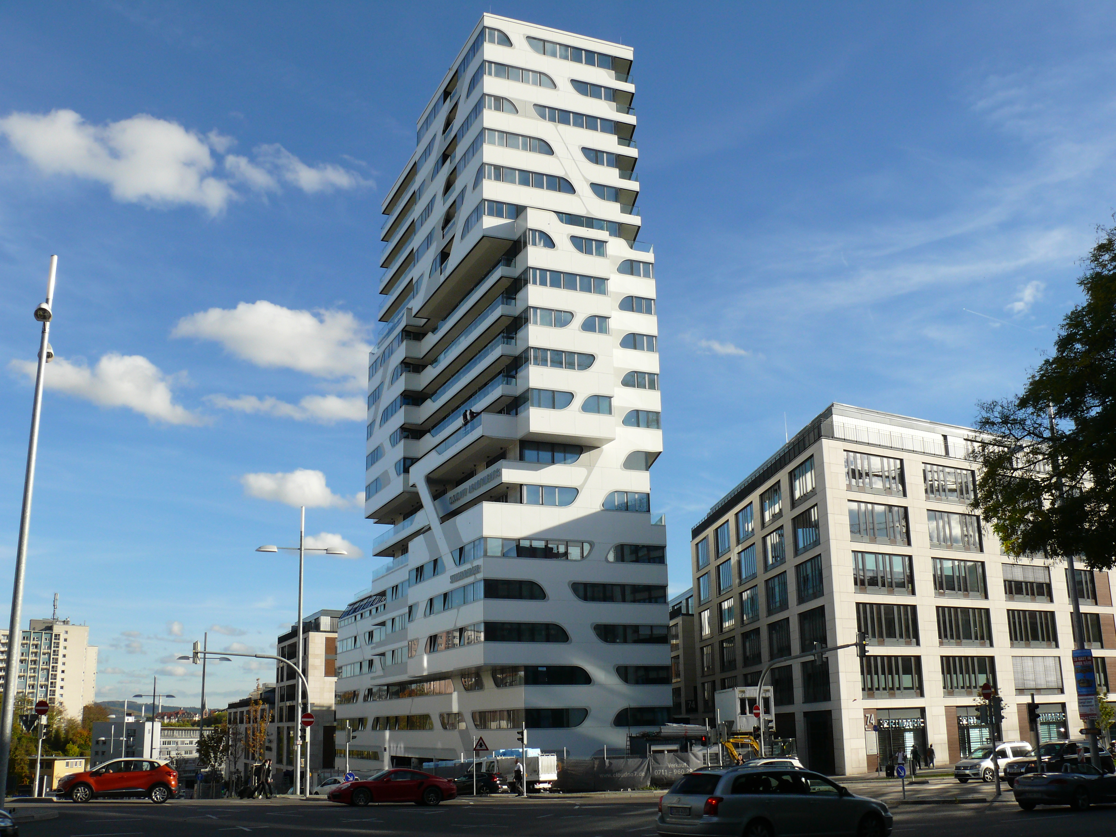 Das Hochhaus "Cloud No7" im Europaviertel in Stuttgart, im Oktober 2017.